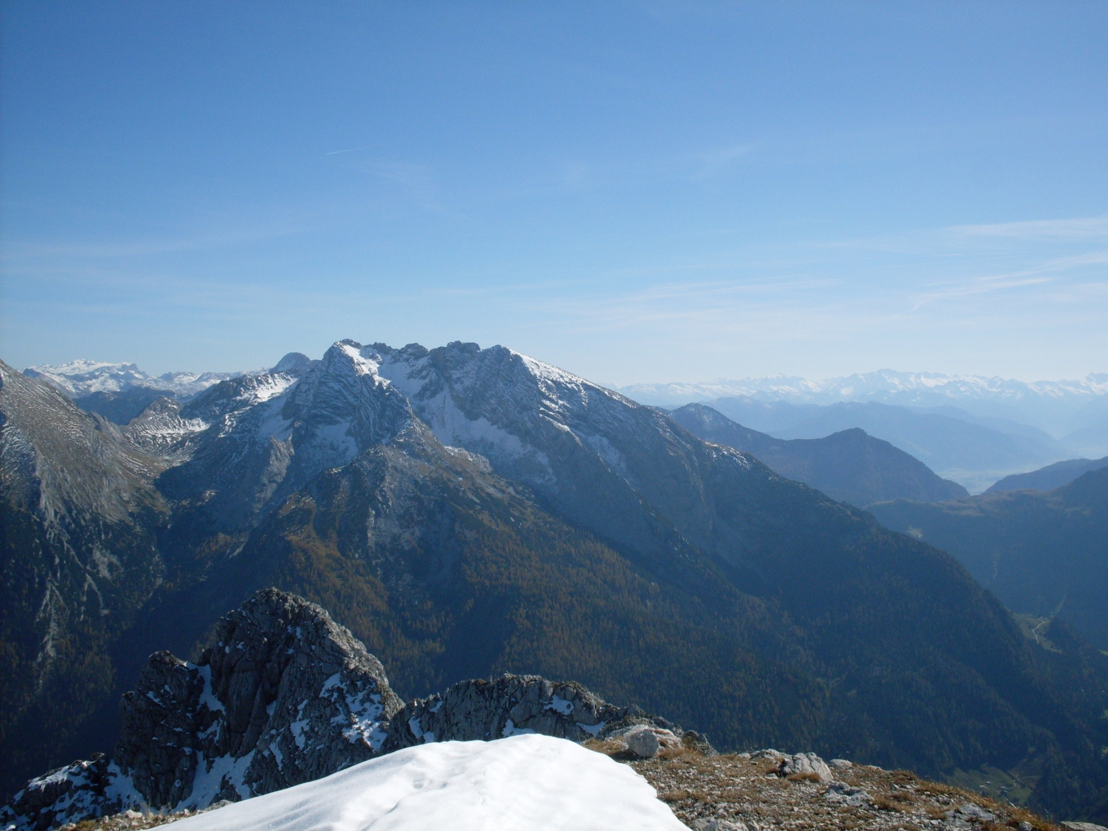 Hocheisgruppe von Nordwesten (Stadelhorn, Reiter Alm)